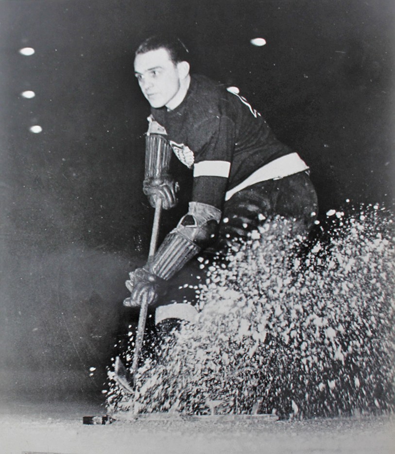 Herbie Lewis